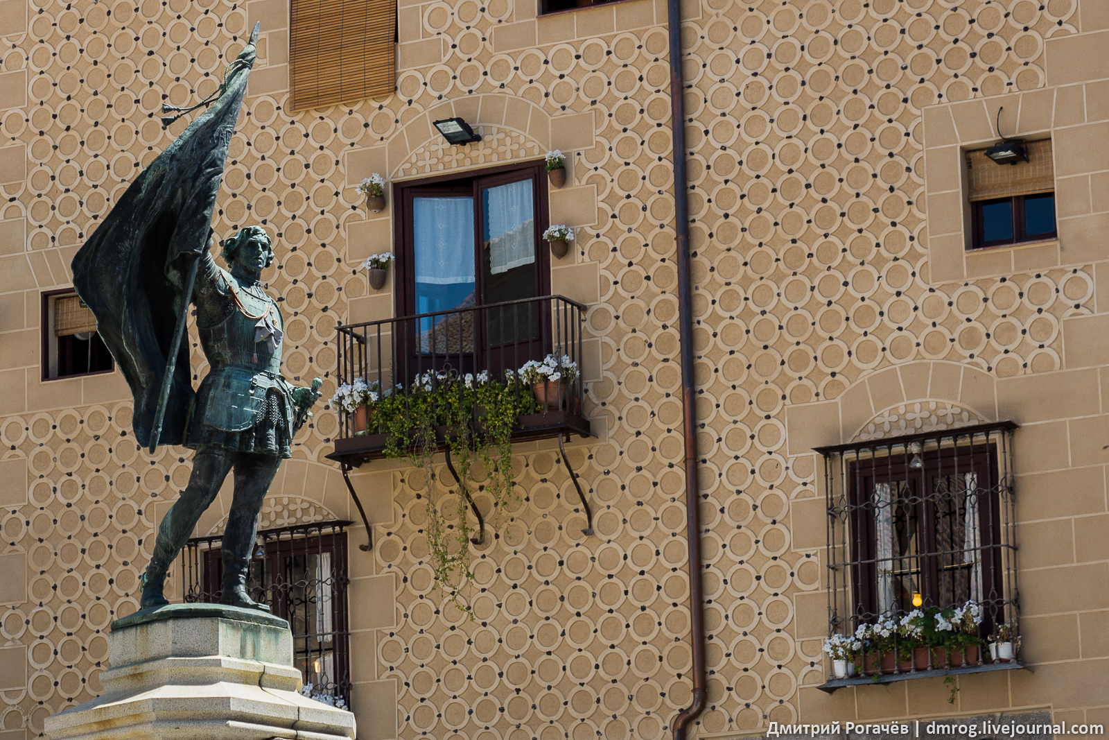 Фотография является честью фоторепортажа, опубликованного автором в личном блоге по адресу